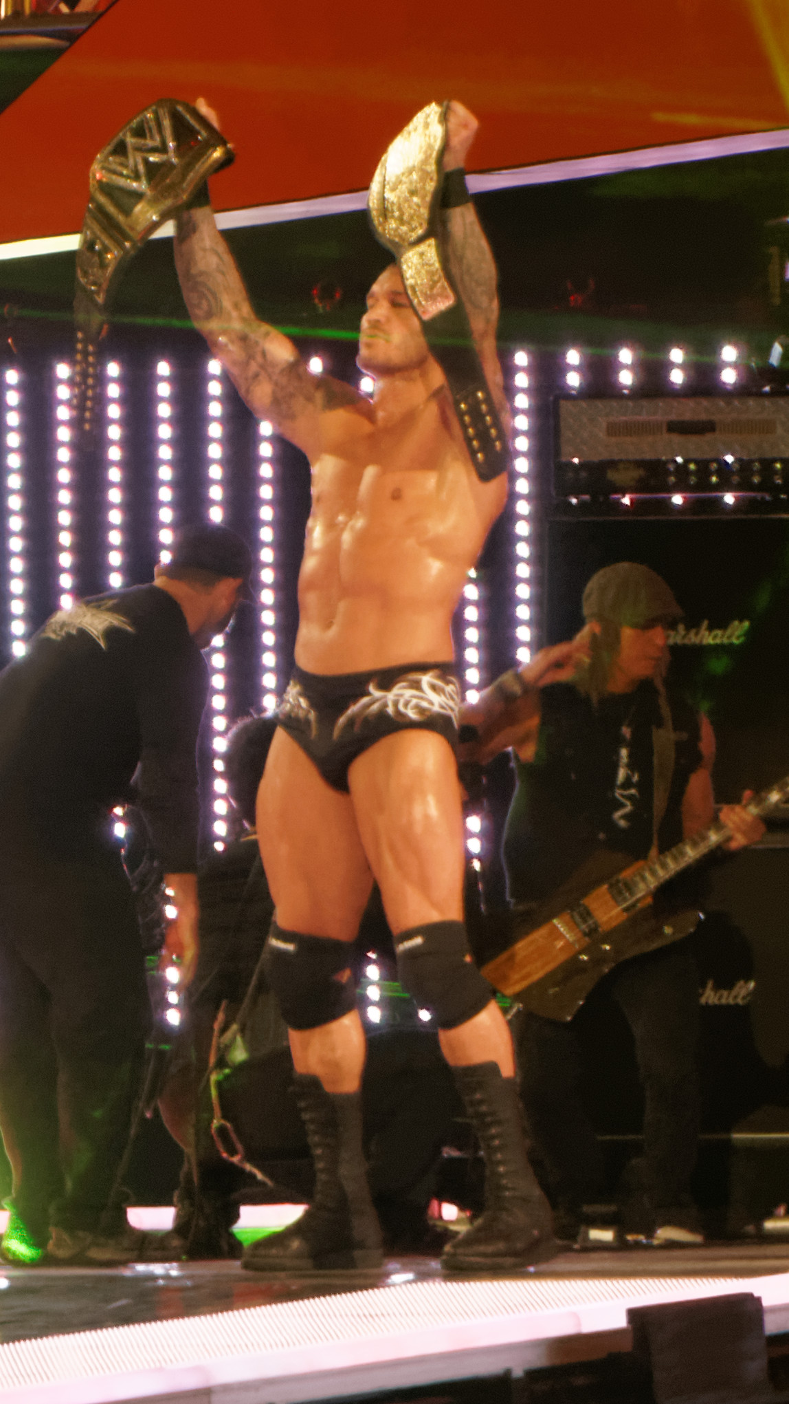 2014-04-06_21-18-52_NEX-6_0119_DxO